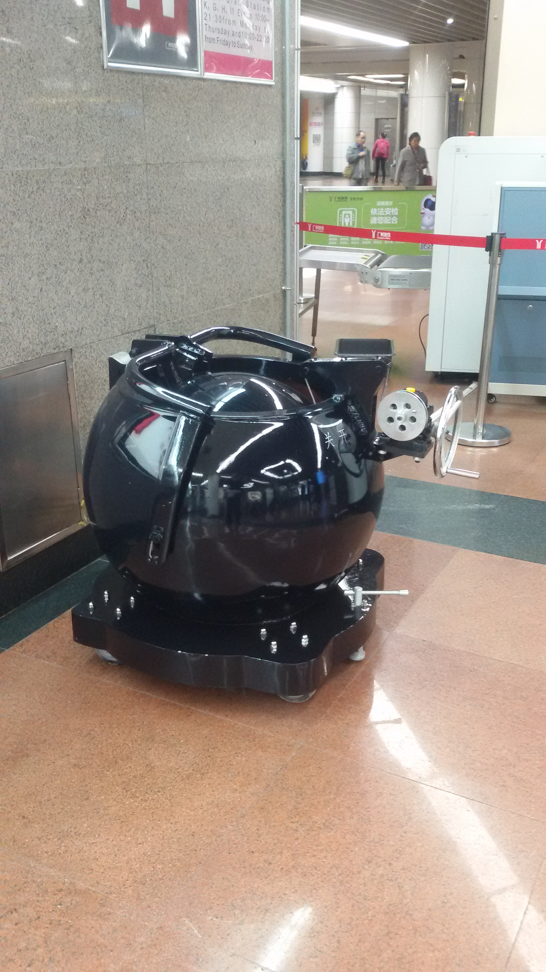 粵語: 危險物品儲存罐